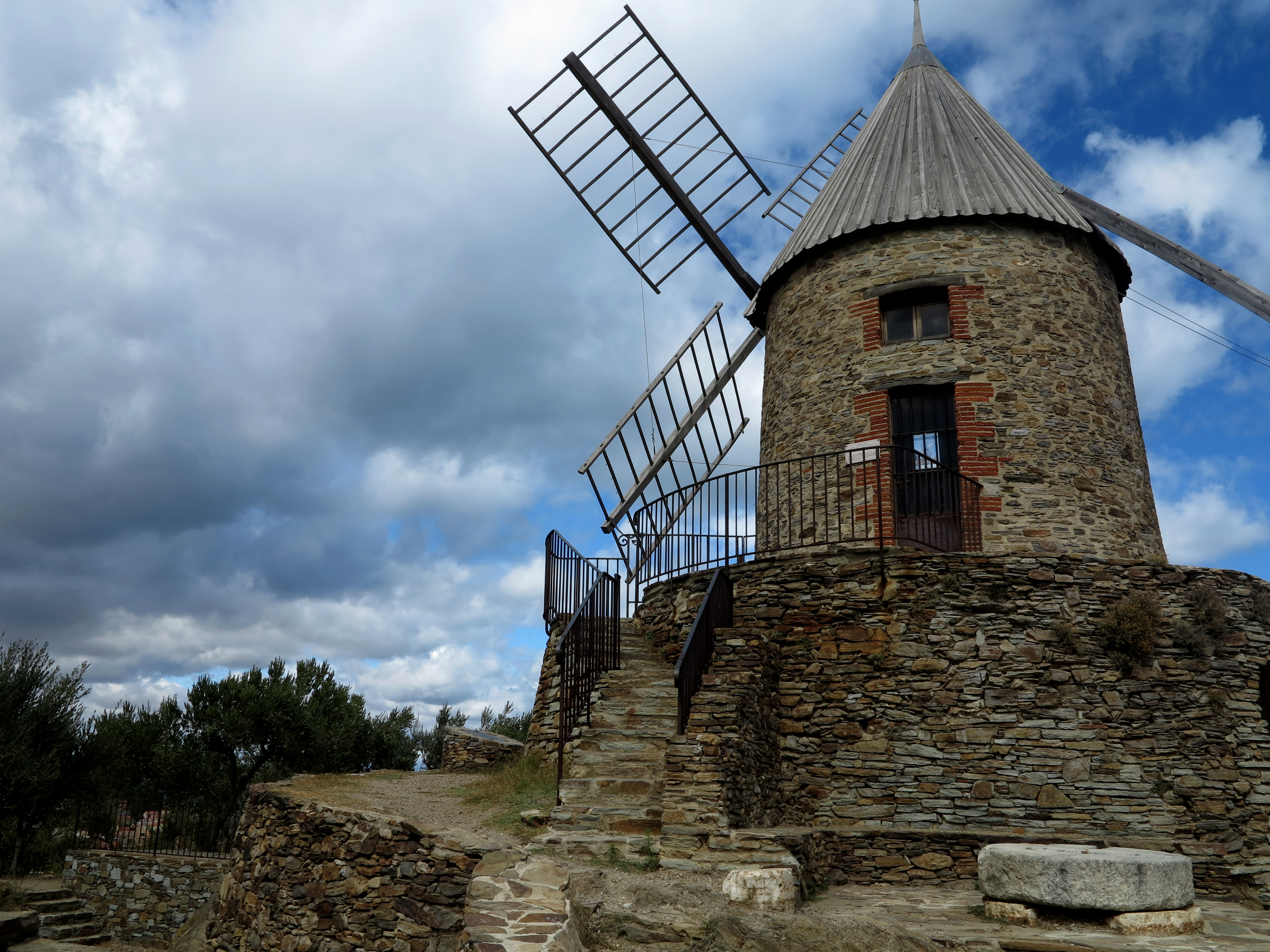 Ancien moulin à farine transformé en moulin à huile, il se visite quelques jours par semaine.